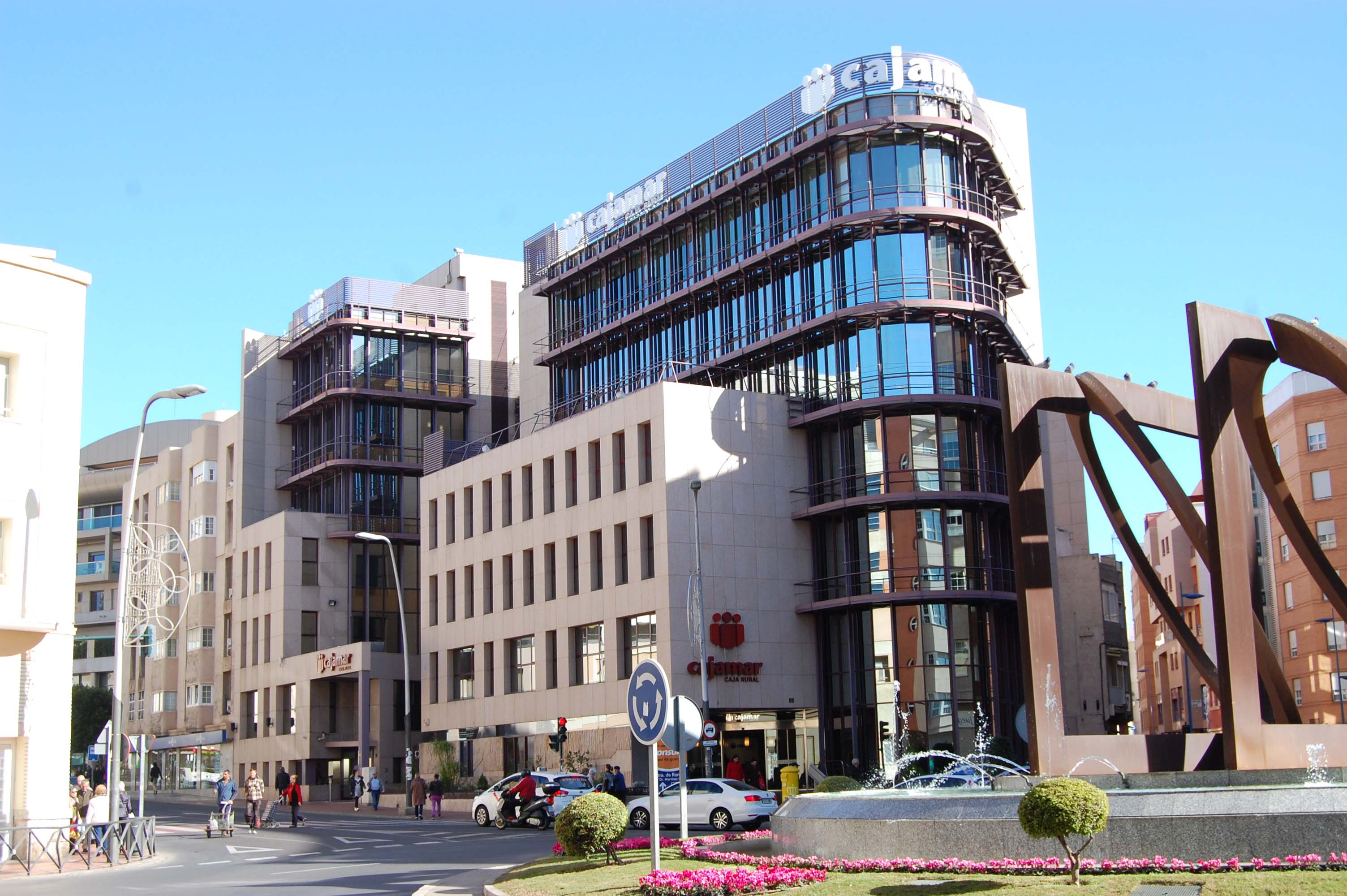 Sede social de Cajamar Caja Rural